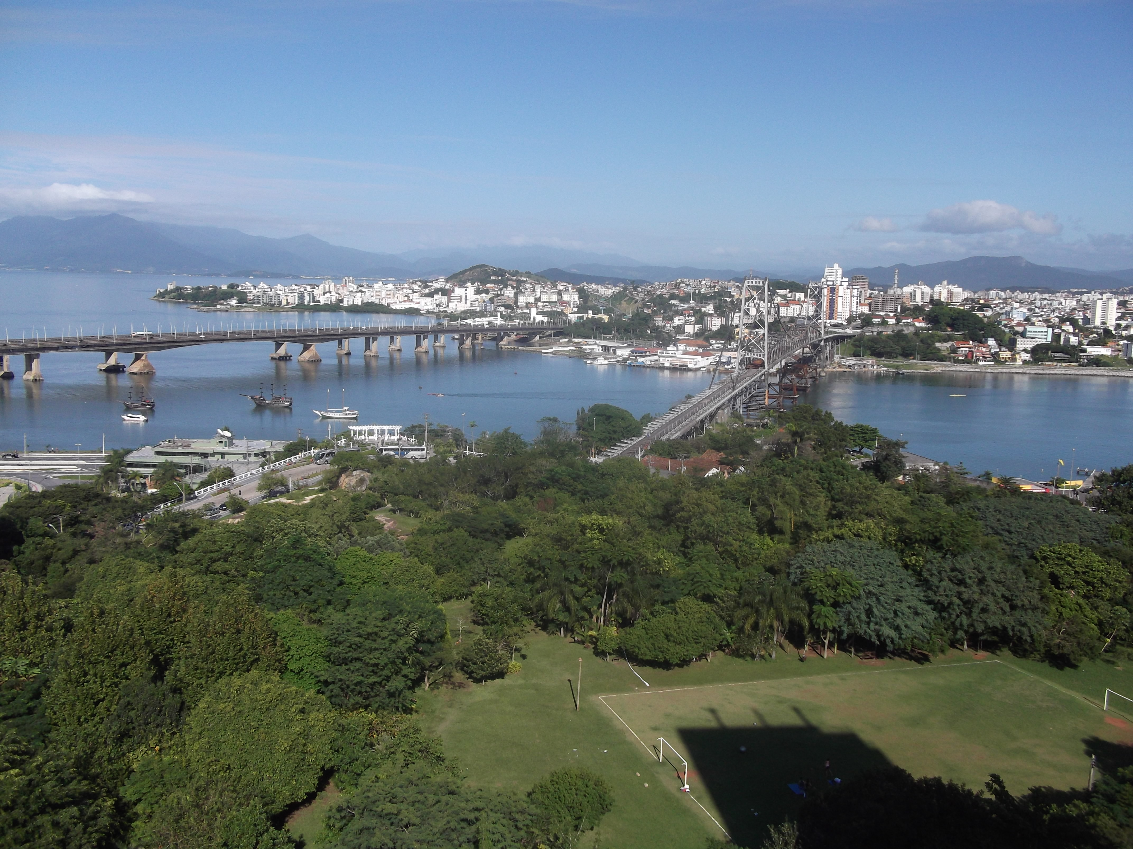 Ponte Colombo Salles e Ponte Hercílio Luz, Florianópolis, Brasil